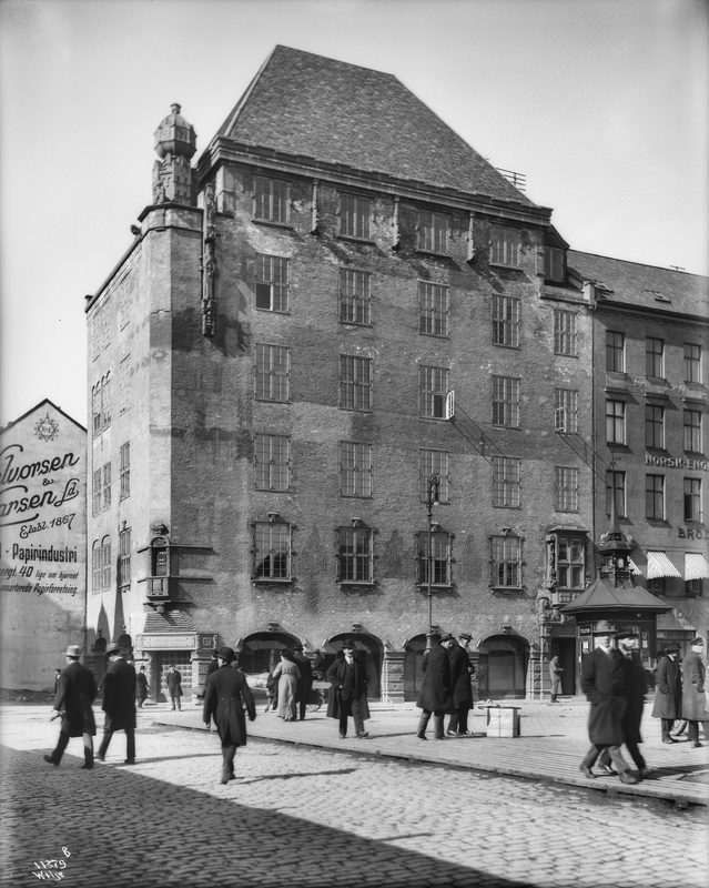 DFDS-gården, forretningsgård, gavlreklame, kiosk, hestekjøretøy, mennesker, gateliv.